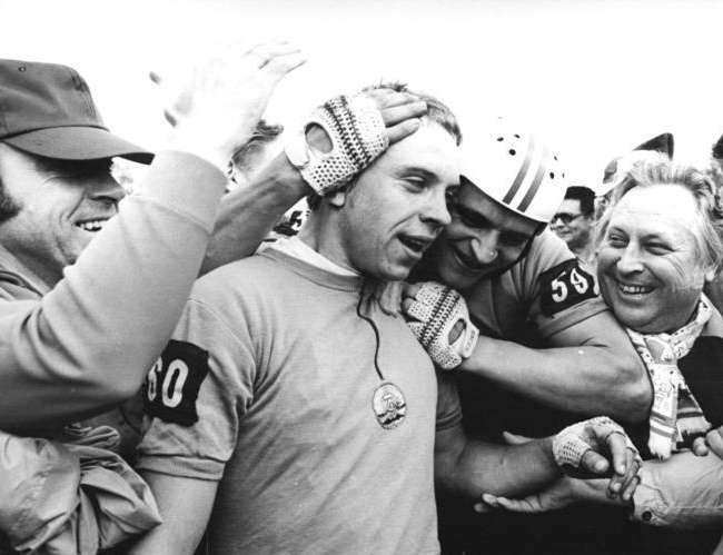 K. Ampler, A. Petermann, Siegbert Schmeisser ADN-ZB Reiche 16.5.77-str-Dresden: 30. Internationale Friedensfahrt - 9. Etappe Cottbus - Dresden über 149 km Jubel über den Etappensieg des Friedensfahrts-Neuling Siegbert Schmeißer (2.v.l.) aus der DDR-Mannschaft, Trainer Klaus Ampler (l.) und Andreas Petermann (M.) sowie die Fahrt Begleitende DDR-Journalisten sind die ersten Gratulanten. Abgebildete Personen: Ampler, Klaus: Radrennfahrer, DDR (GND 131439561) Petermann, Andreas: Radsportler, Friedensfahrtteilnehmer, DDR Schmeisser, Siegbert: Radrennsportler, DDR